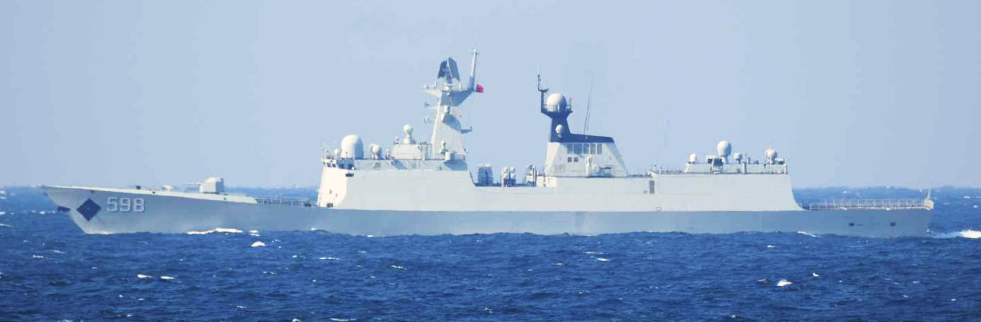 ２月２３日（土）午後９時頃、海上自衛隊第１４護衛隊所属「せんだい」（舞 鶴）が、上対馬の東北東約１１０ｋｍの海域を南西進するルーヤンⅢ級ミサイ ル駆逐艦１隻及びジャンカイⅡ級フリゲート２隻を確認した。 その後、これらの艦艇が対馬海峡を南下し、東シナ海に向けて航行したこと を確認した。 なお、これらの艦艇は、２月１６日（土）に対馬海峡を北上した艦艇と同一 である。